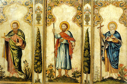 Работа Нагаша Овнатана в Эчмиадзинском монастыре